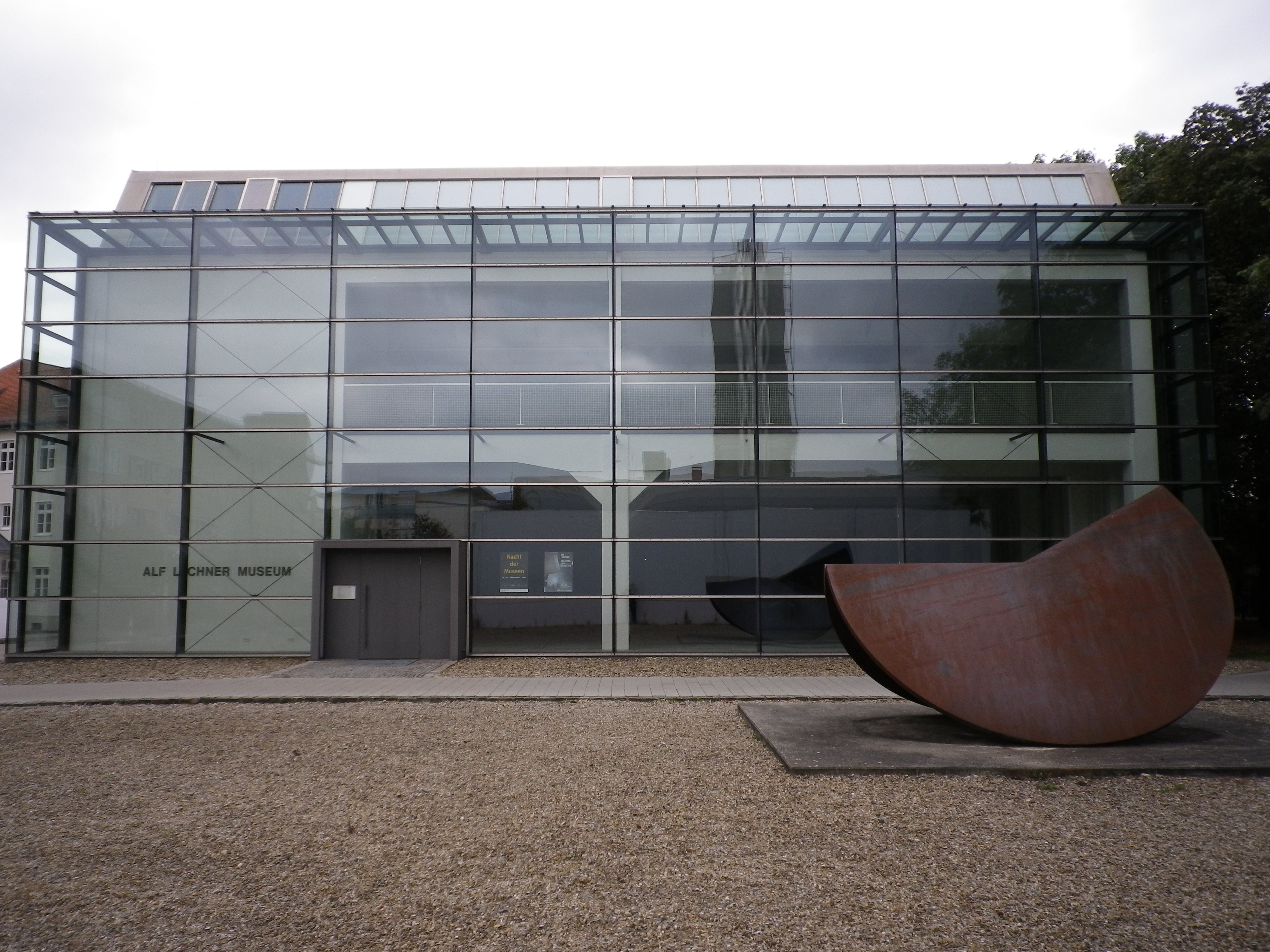 Alf Lechner Museum in Ingolstadt